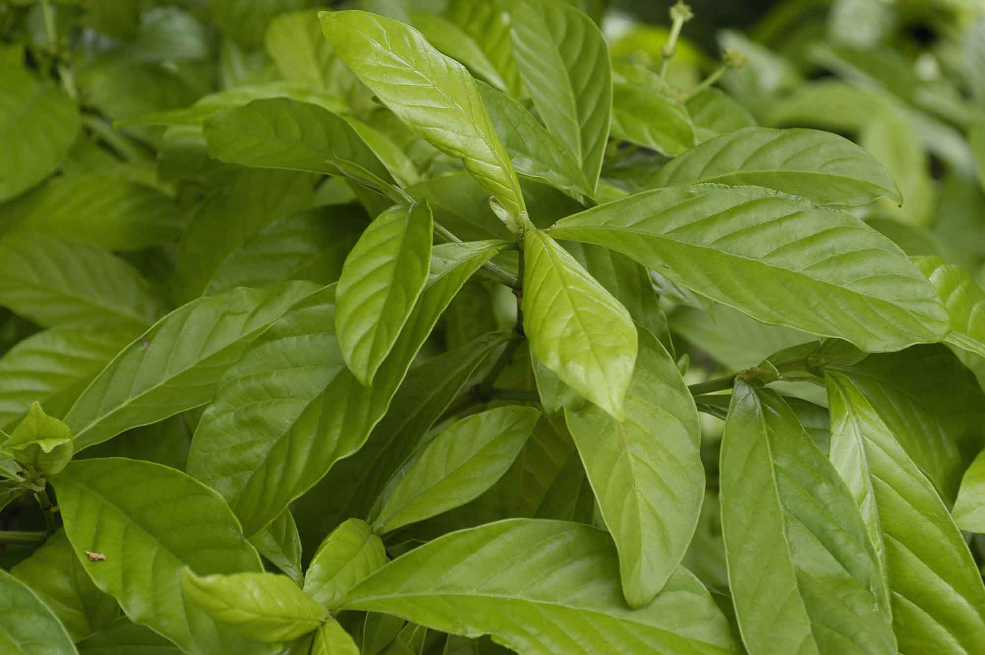 Psychotria viridis (folhas)